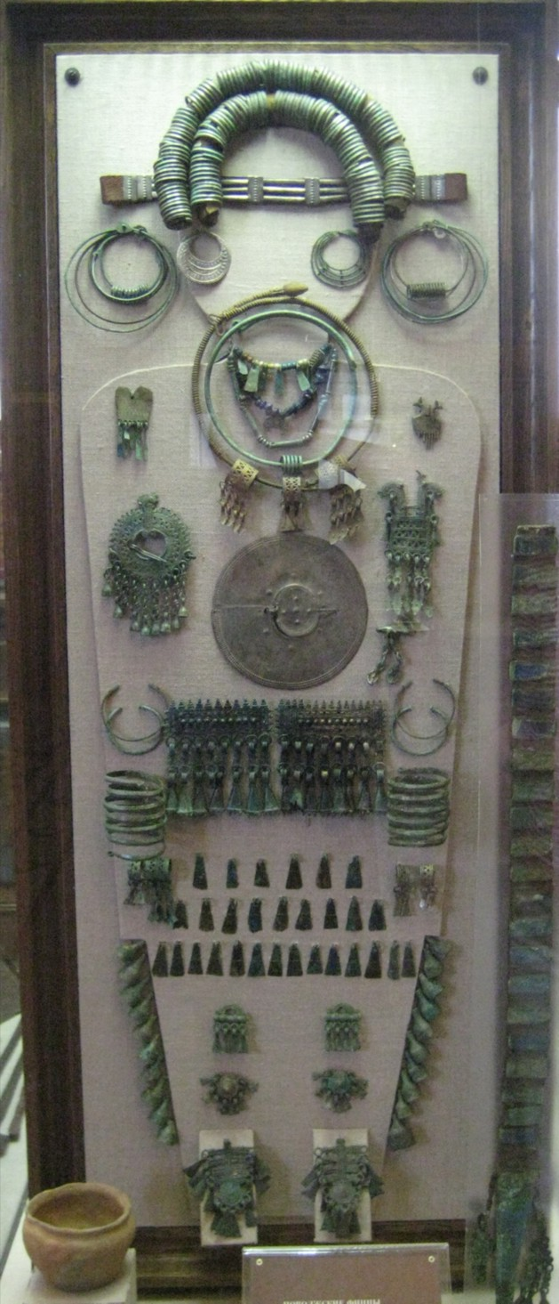 Поволжские финны. Реконструкция металлического убора костюма женщины из племени мурома IX-X вв. Владимирская обл. Экспозиция в ГИМ. Jewels of woman from muroma tribe (Finno-Ugric peoples). 9-10 century.